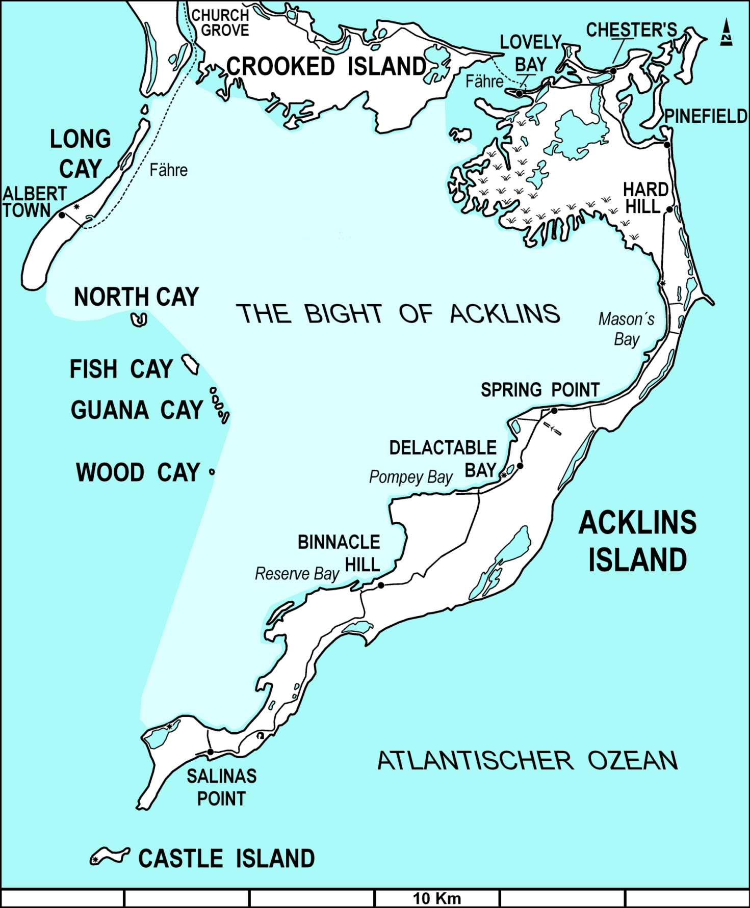 Karte von Acklins, Bahamas